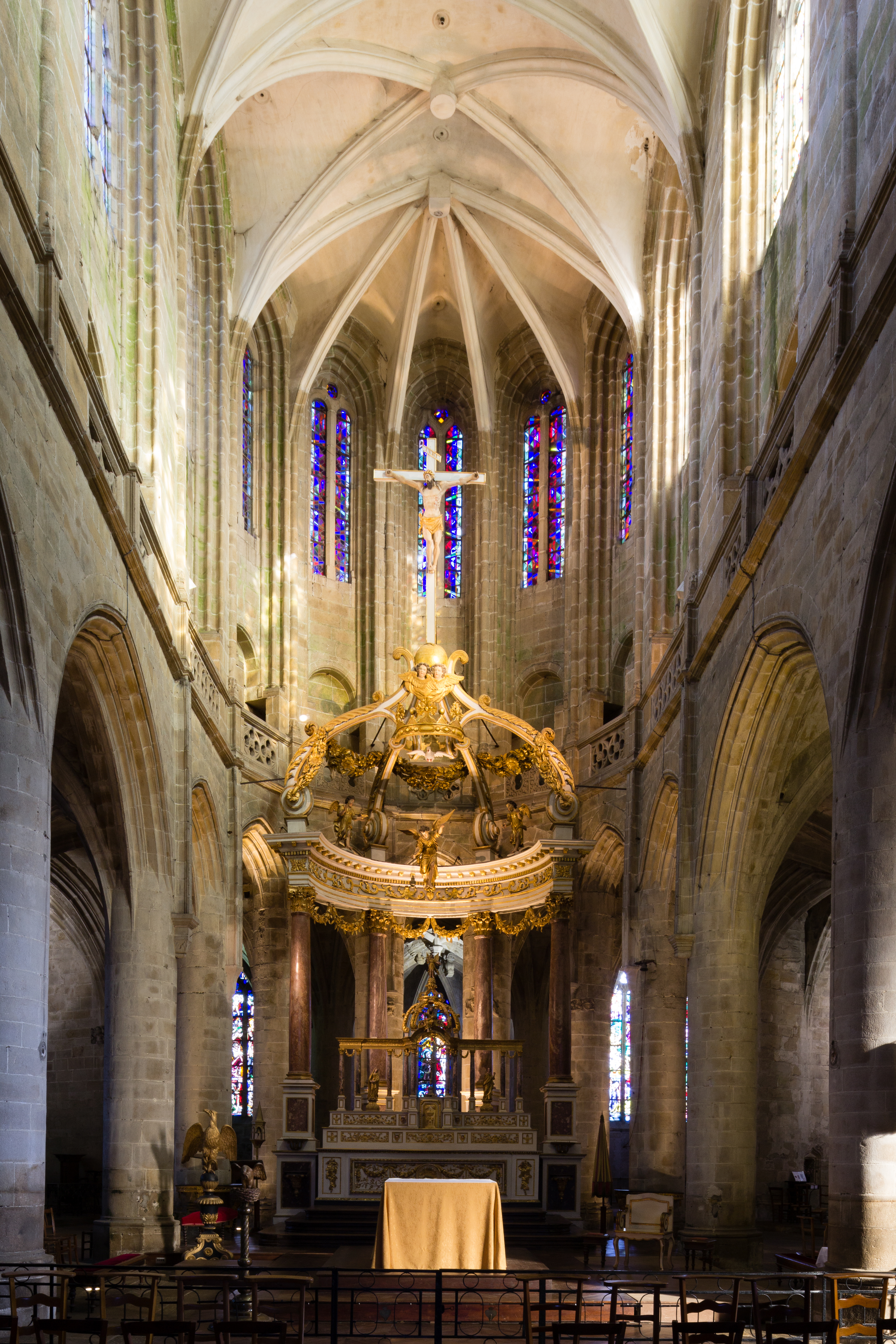 Chœur de la basilique Saint-Sauveur de Dinan (France)